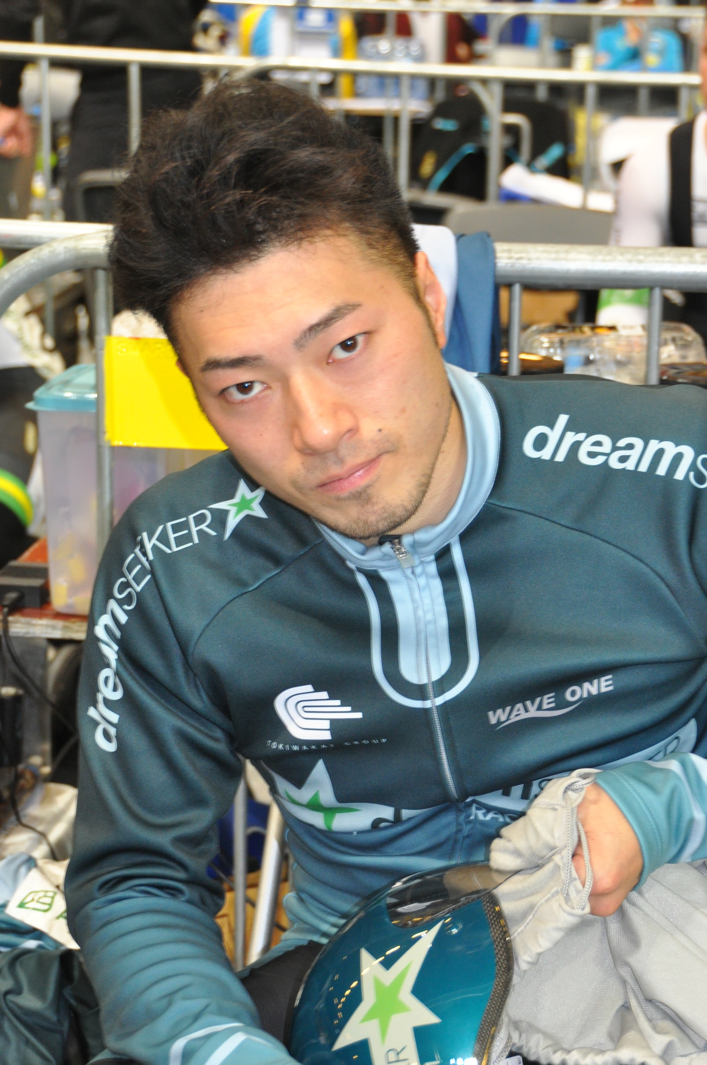 Yudai Nitta